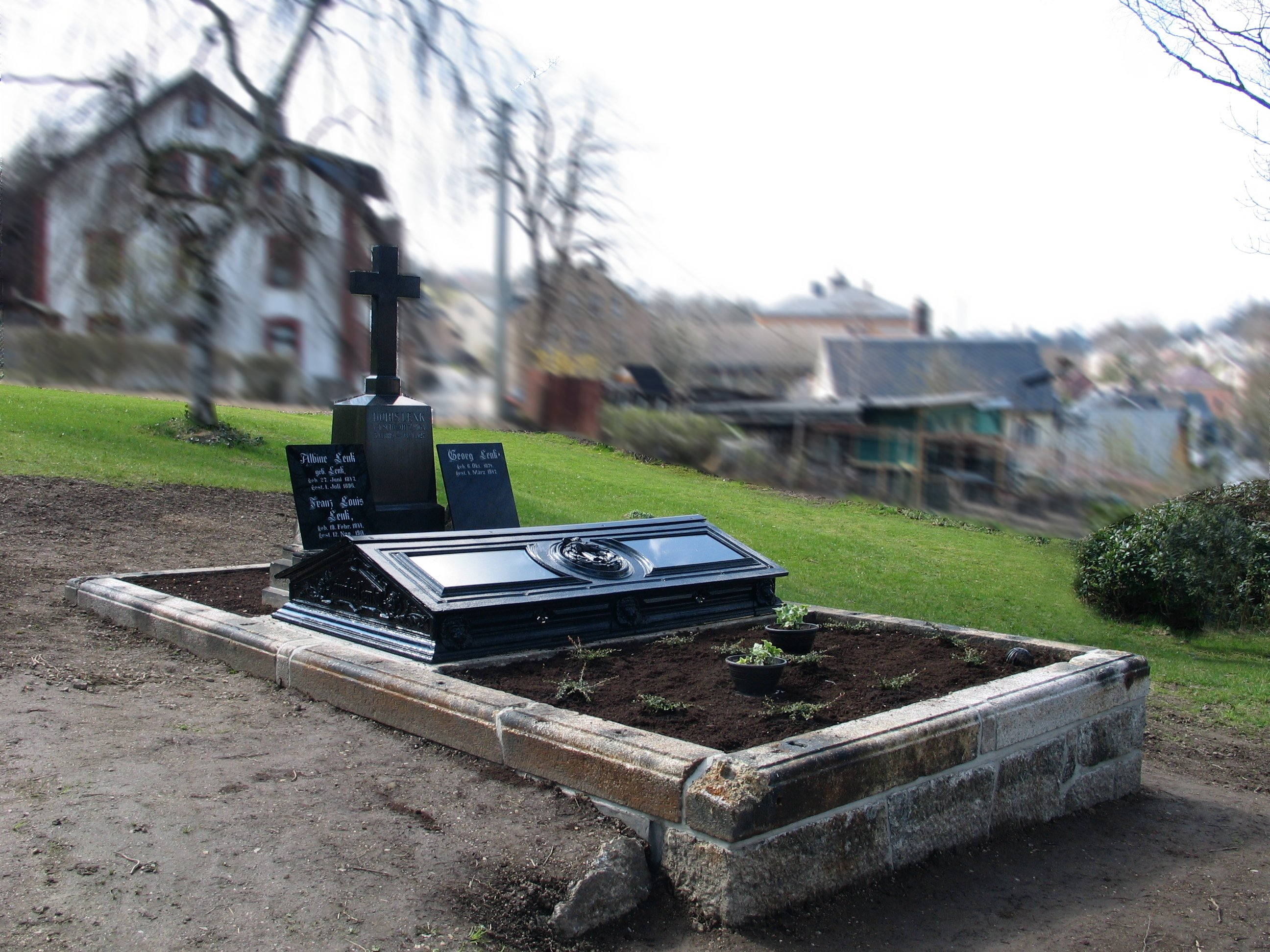 Restaurierte Grabstätte der Familien Lenk auf altem Friedhof.